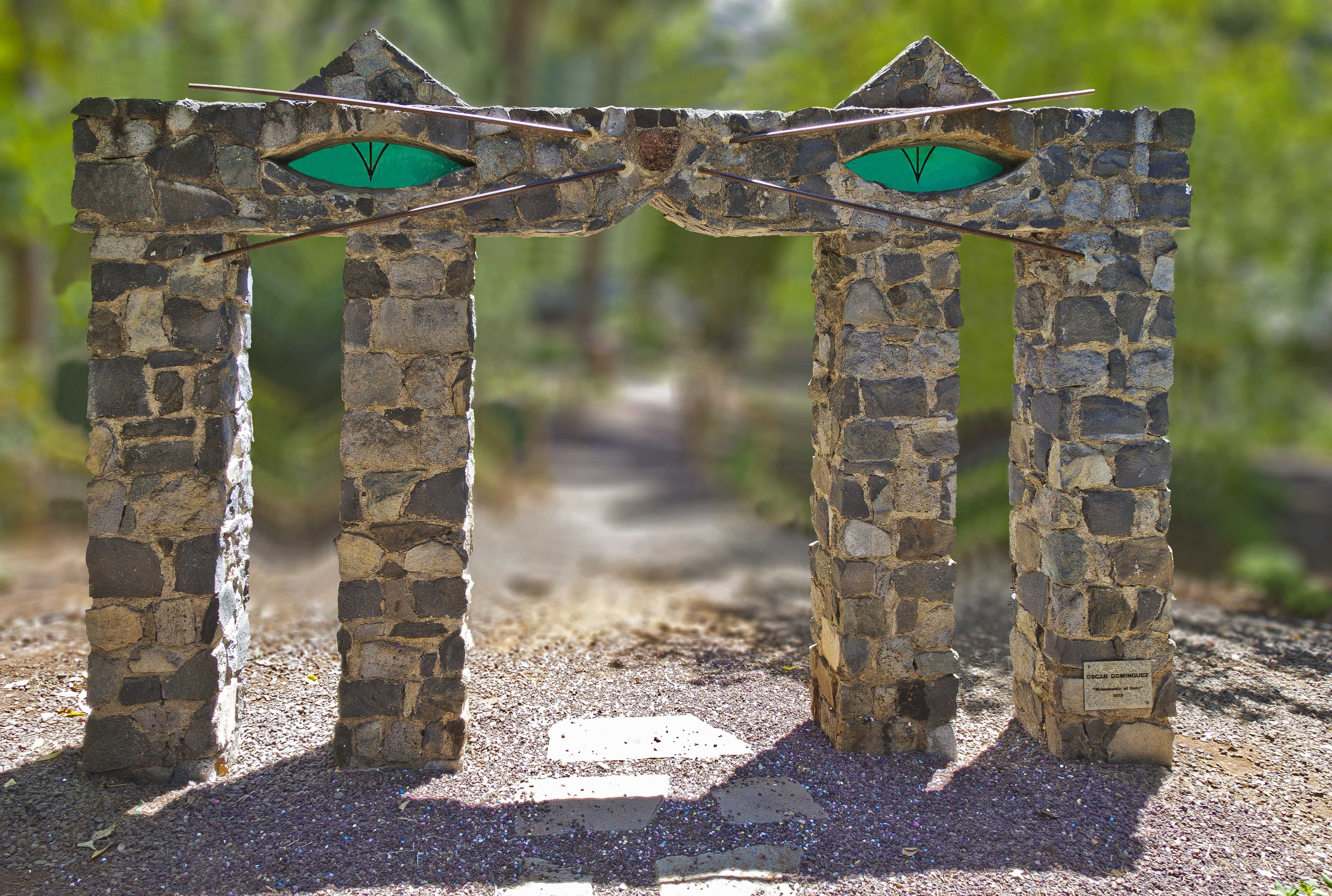 Das Objekt „Monumento al Gato“ wurde von Óscar Domínguez für Marie-Laure, Vicomtesse de Noailles angefertigt und nach seinem Tod (1957) als Replik (1973) in Santa Cruz de Tenerife aufgestellt. Das “Monumento al Gato” (Denkmal für eine Katze) ist eine Replik des Originals, das sich in Hyères (Frankreich) befindet. Dieses Objekt im Parque García Sanabria in Santa Cruz de Tenerife wurde nach Plänen, Fotografien und Aufzeichnungen des Vizconde de Noailles erstellt, in dessen Eigentum sich das Original befindet. Das Objekt wurde im Rahmen der „Iª Exposición Internacional de Escultura en la calle: Santa Cruz de Tenerife, 1973” errichtet. (Erste Internationale Ausstellung Plastiken im Öffentlichen Raum in Santa Cruz de Tenerife, 1973) Die Ausmaße sind 2,90 m x 3,80 m x 0,40 m